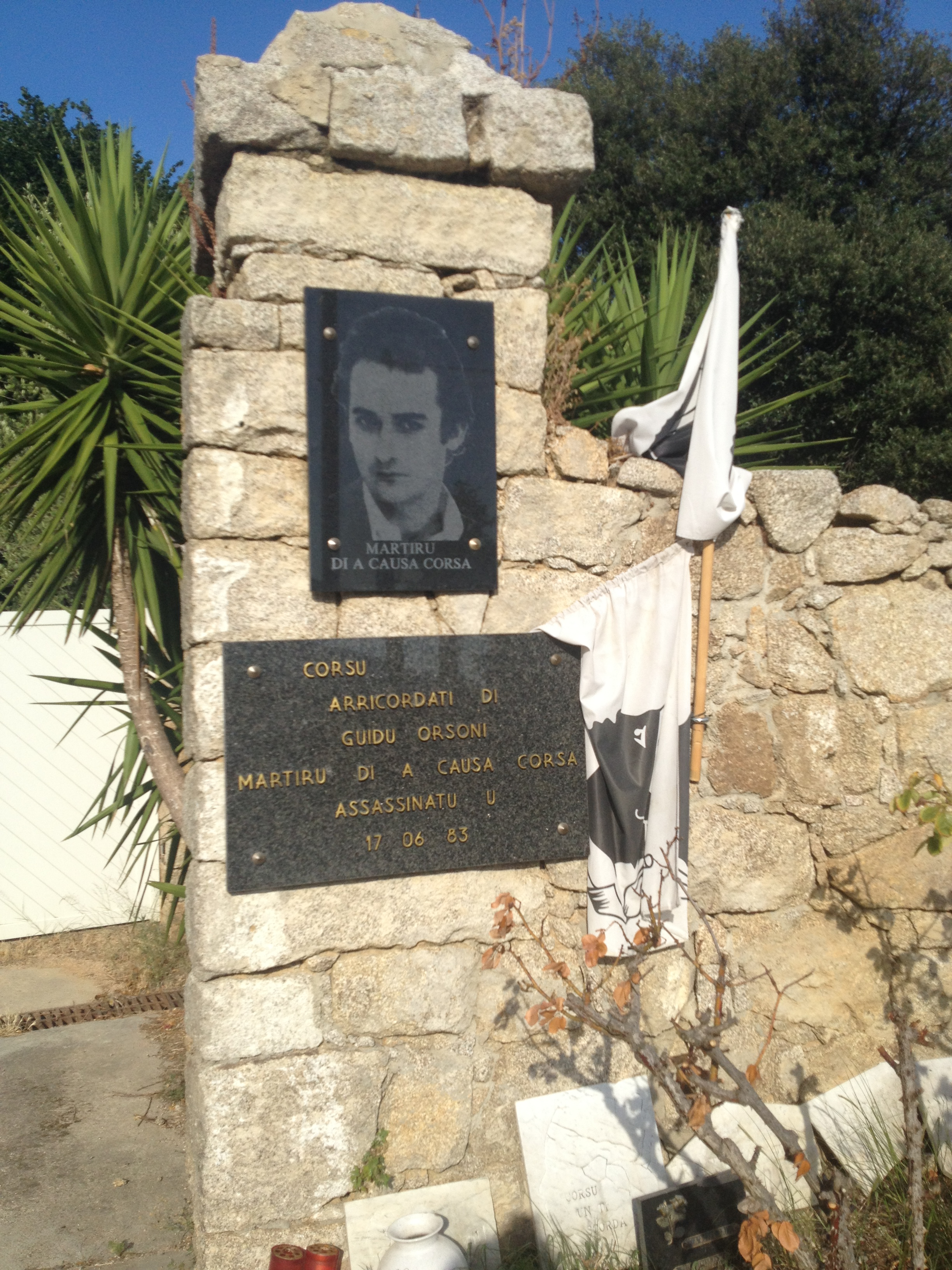 militant français nationaliste corse assassiné le 17 juillet 1983